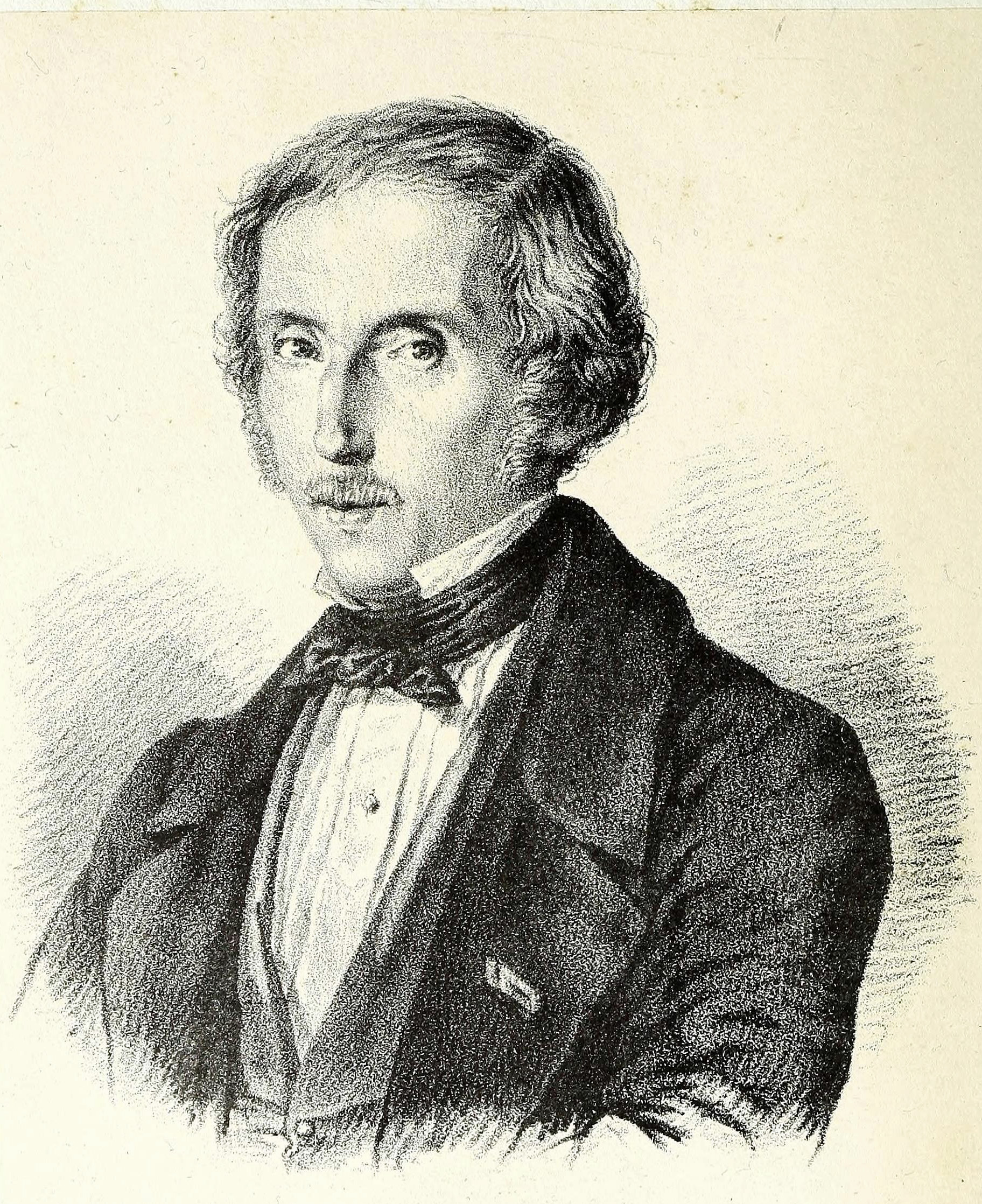 Ritratto di Samuele Jesi, da una litografia di Ant Villa.